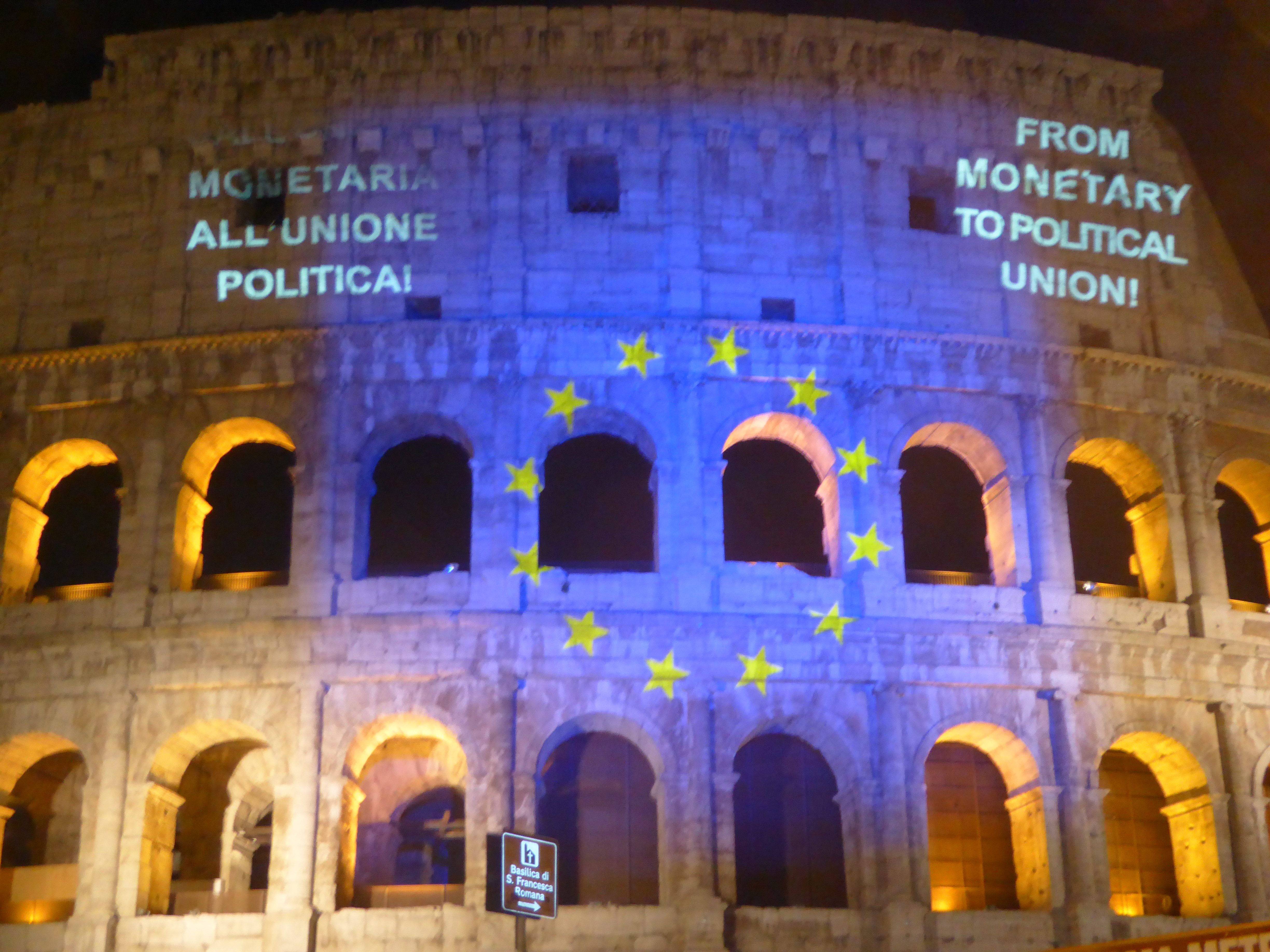 Viste europee di Roma intorno alle celebrazioni del 25 marzo 2017.